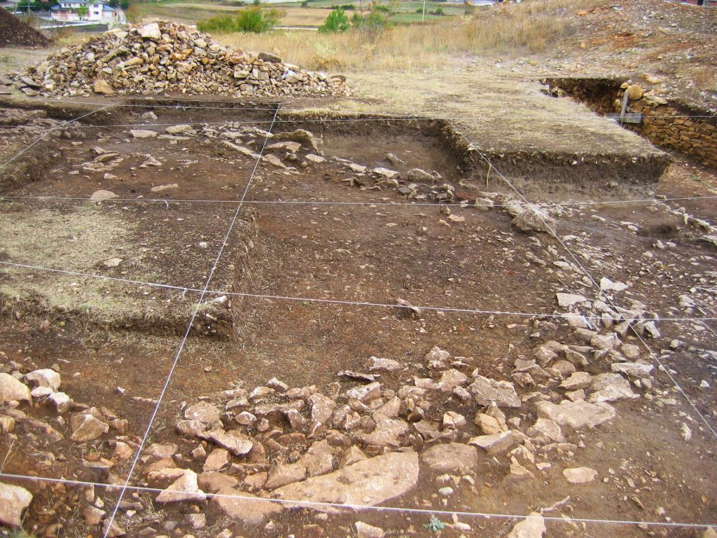 Castro Cántabro de La Loma. Santibáñez de la Peña (Palencia, Castilla y León). Vista interior de varios fondos de cabañas de la II Edad del Hierro tras la puerta de la muralla.